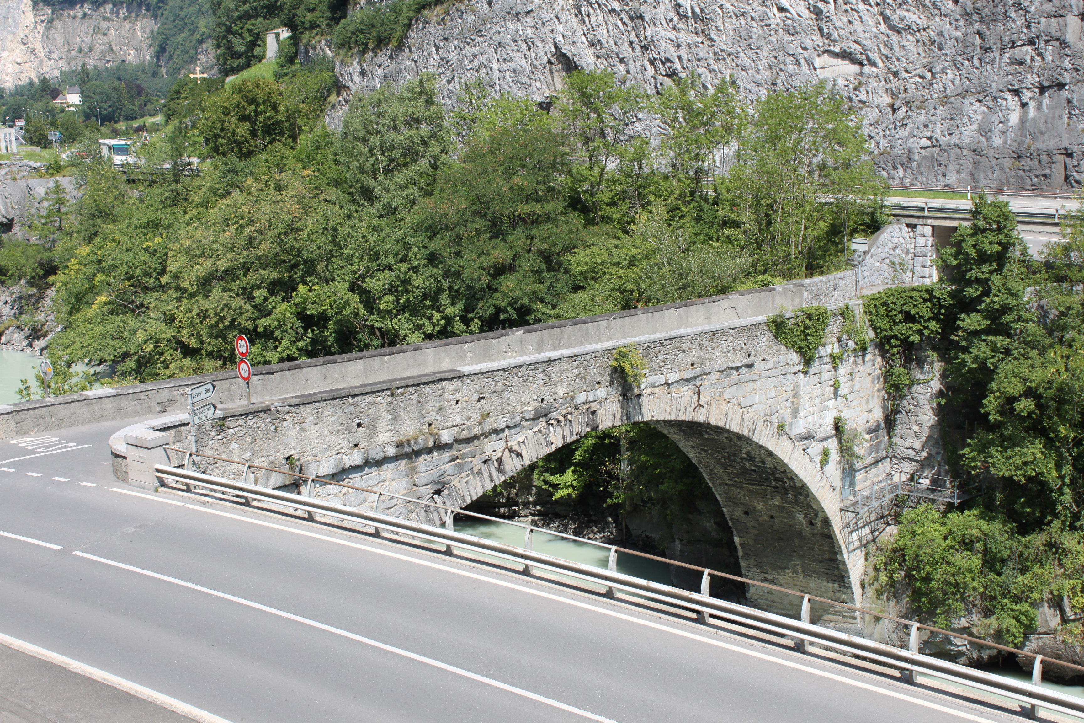 Pont sur le Rhône à St-Maurice (Suisse)